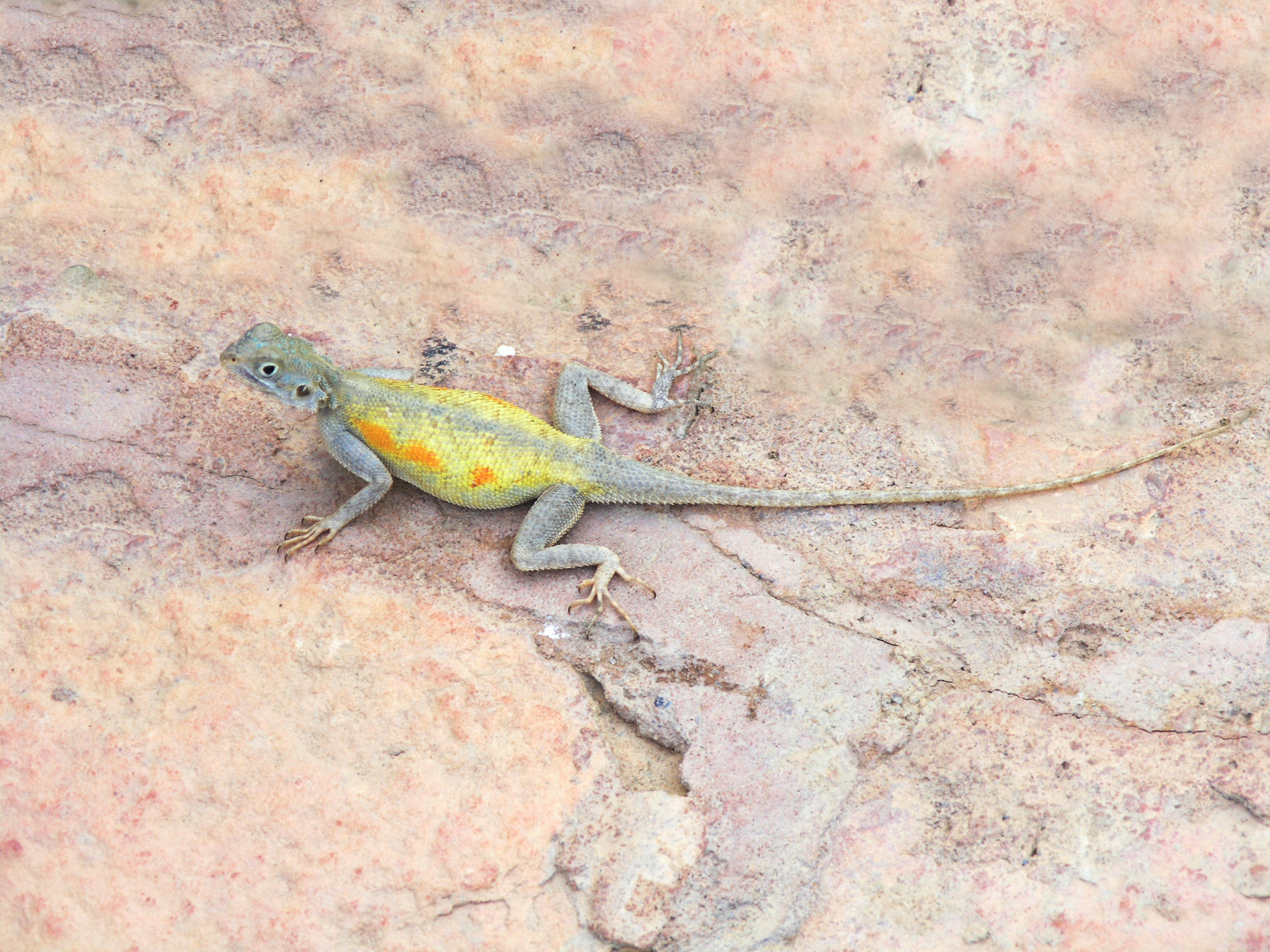 Creo que se trata de una hembra de Agama impalearis